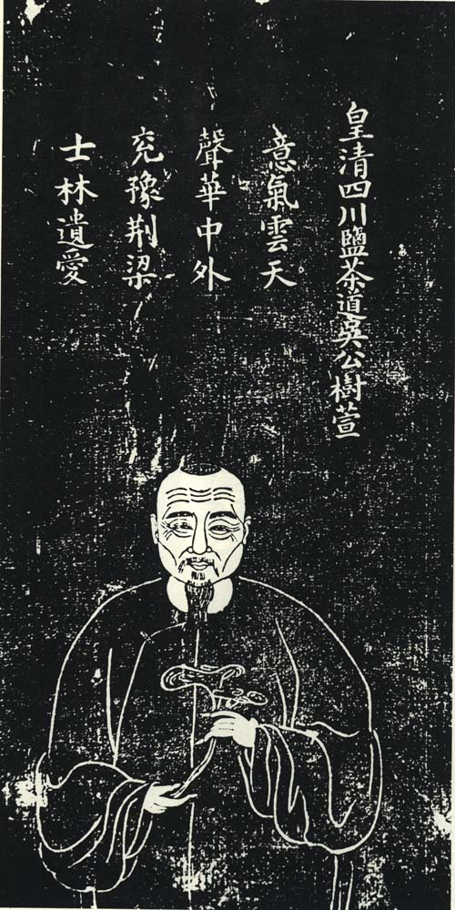 吴树萱（1746年－1797年），字少甫，江苏苏州府长洲县（今苏州市）人。